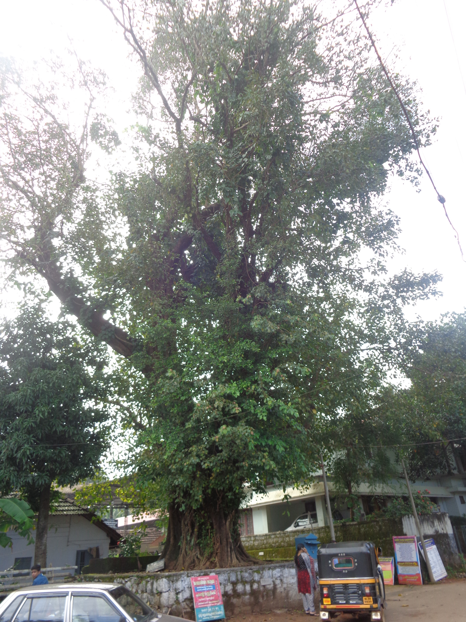 അരുകിഴായ ക്ഷേത്രത്തിനു പടിഞ്ഞാറെ ആൽ